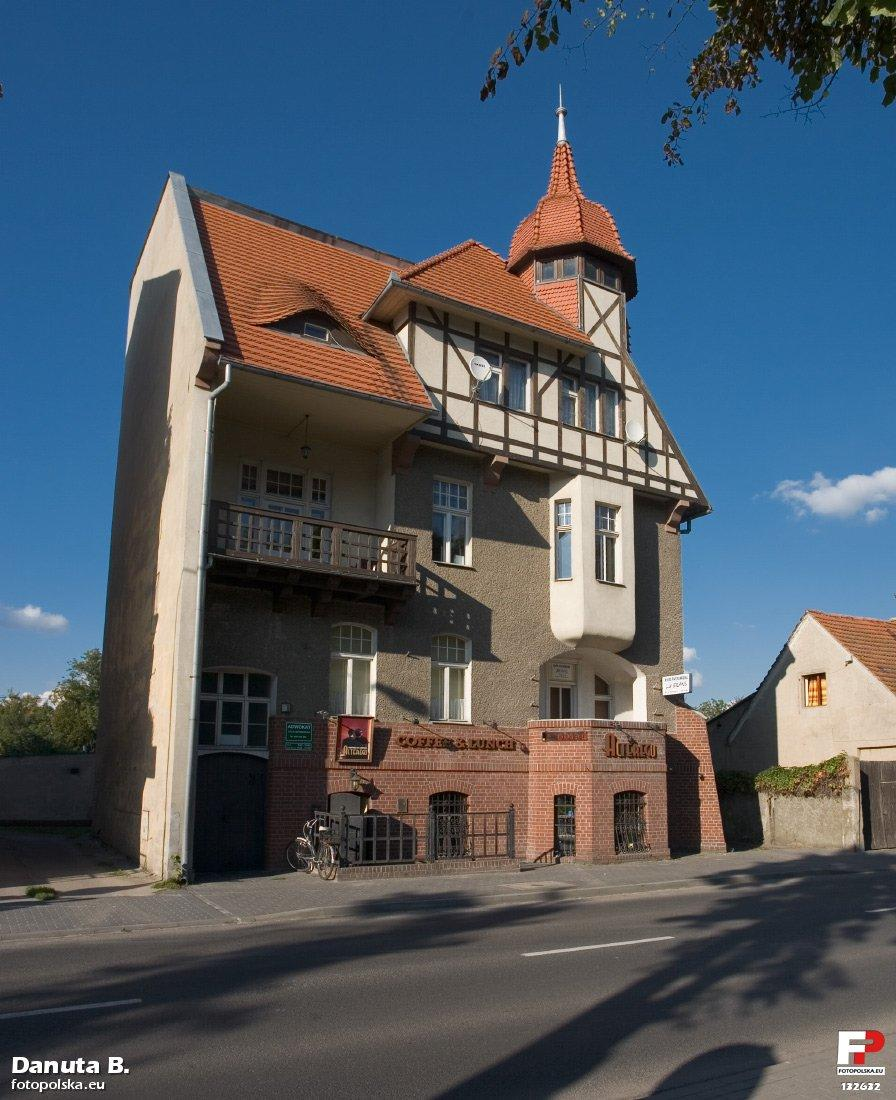 Ta przepiękna willa należała przed wojną do Gustawa Gebauera, lekarza. Widziałam przedwojenne zdjęcie, na którym widać było, ze lewej strony przybudowany był do niej inny budynek, rozebrany po wojnie.